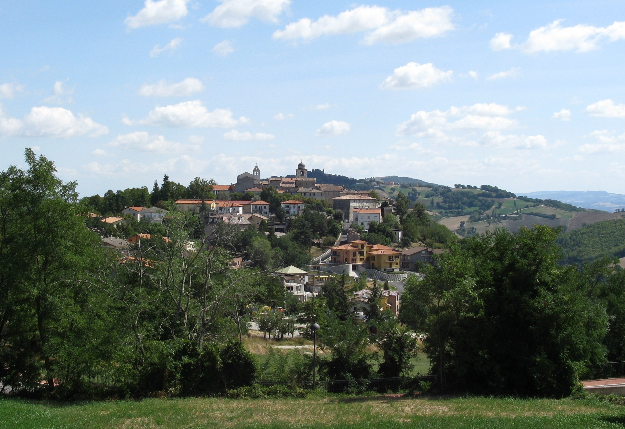 Panorama di Monte Grimano Terme.